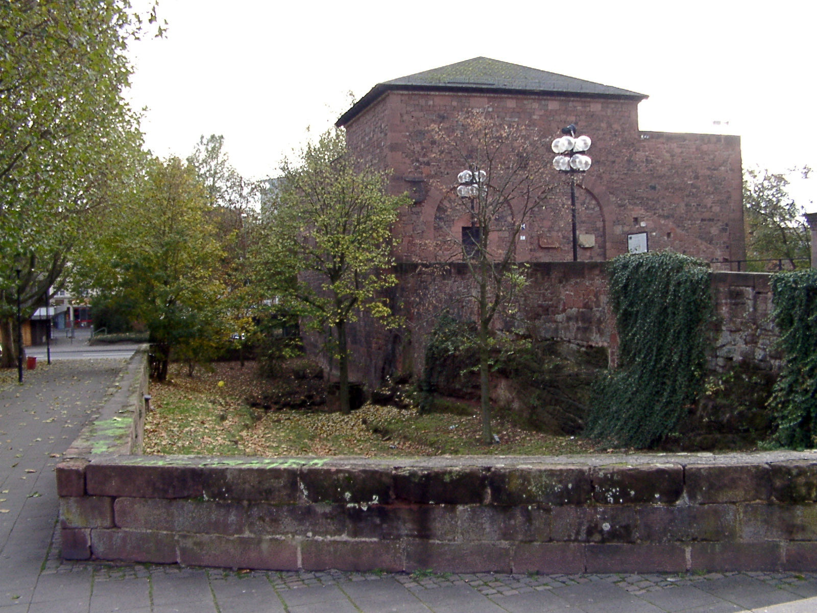 Casimirbau an der Kaiserpfalz Kaiserslautern